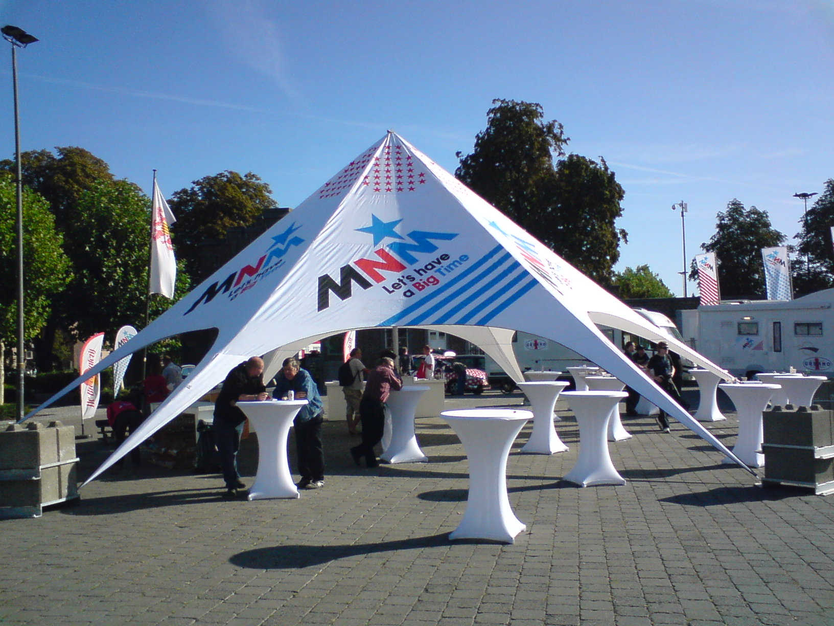 tent MNM